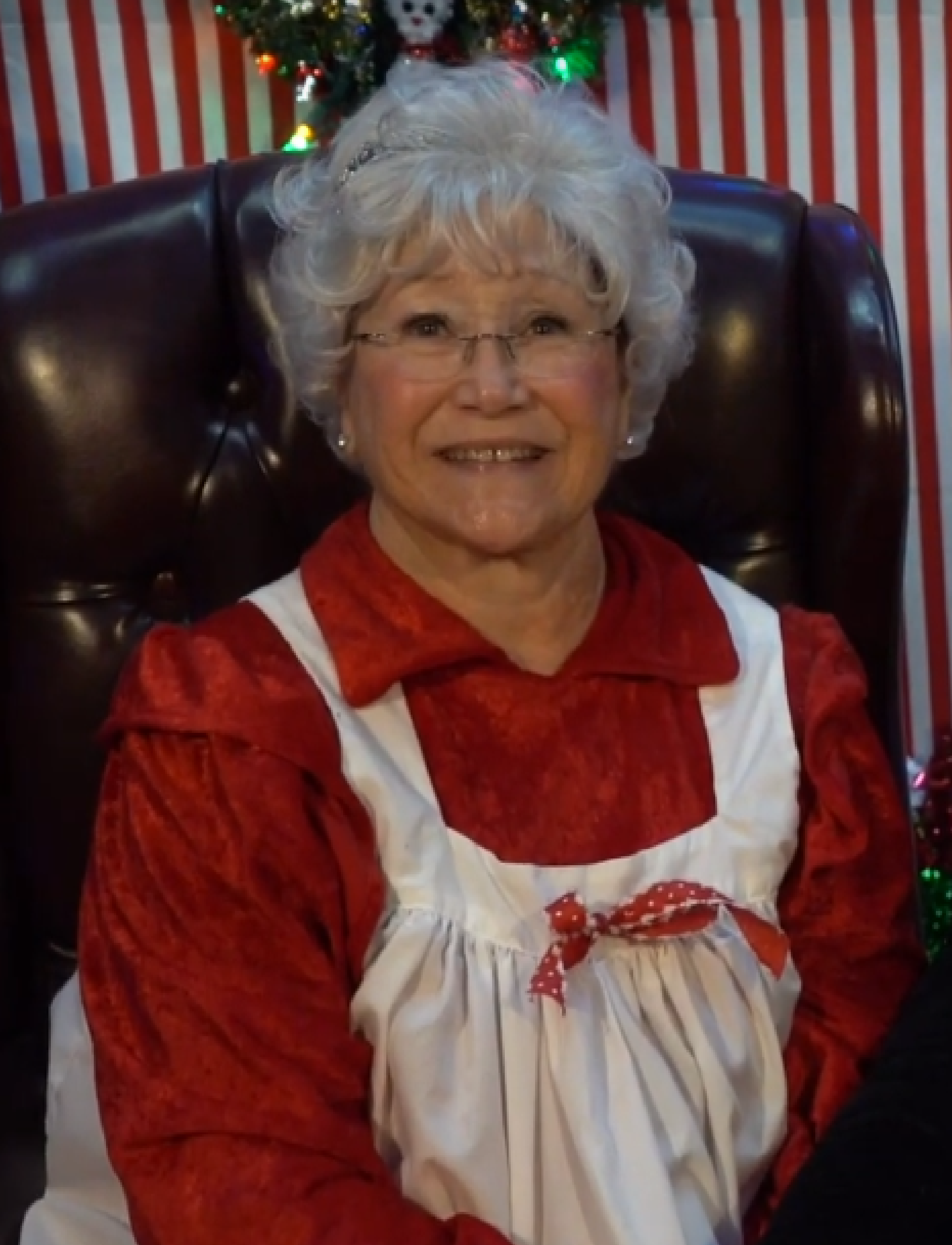 Señora Claus